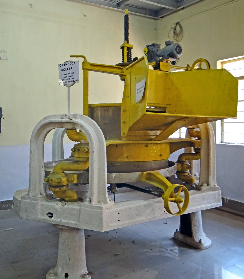 Machine de roulage des feuilles de thé selon le procédé orthodoxe Le musée du thé (Tea Museum) est un musée privé situé au coeur des plantations de la région de Munnar Il appartient à la société Kanan Devan Hills Plantations Company Private Limited (KDHP) qui a racheté, il y a quelques années, à Tata Tea Limited les plantations de cette région. Ce petit musée présente l'histoire du site avec des photographies anciennes et un film ainsi que des objets (machines à écrire, à calculer, dispositifs électriques...) utilisés par les premiers exploitants anglais qui sont à l'origine de la culture du thé au Kerala. Il montre également une chaine de traitement des feuilles de thé noir selon deux procédés : le procédé orthodoxe et le procédé CTC (Crush, Tear and Curl). Au cours de la visite, il est évoqué la manière de fabriquer le thé vert et le thé blanc. Une boutique permet d'acheter différentes sortes de thé. Dans les années 1930, s’inspirant des machines développées au siècle dernier pour le procédé Orthodoxe, Sir William McKercher pousse plus loin l’industrialisation de la transformation du thé en mettant au point le procédé CTC, de l’anglais crushing, tearing and curling (broyage, déchiquetage et roulage). Il s’agit de combiner plusieurs étapes de la transformation en 3 étapes simples durant lesquelles les feuilles de thé seront séchées, déchiquetées, oxydées et roulées. Cette technique permet d’augmenter considérablement le rendement de la production en accélérant le processus d’oxydation, en simplifiant le procédé, et en standardisant la qualité. selon